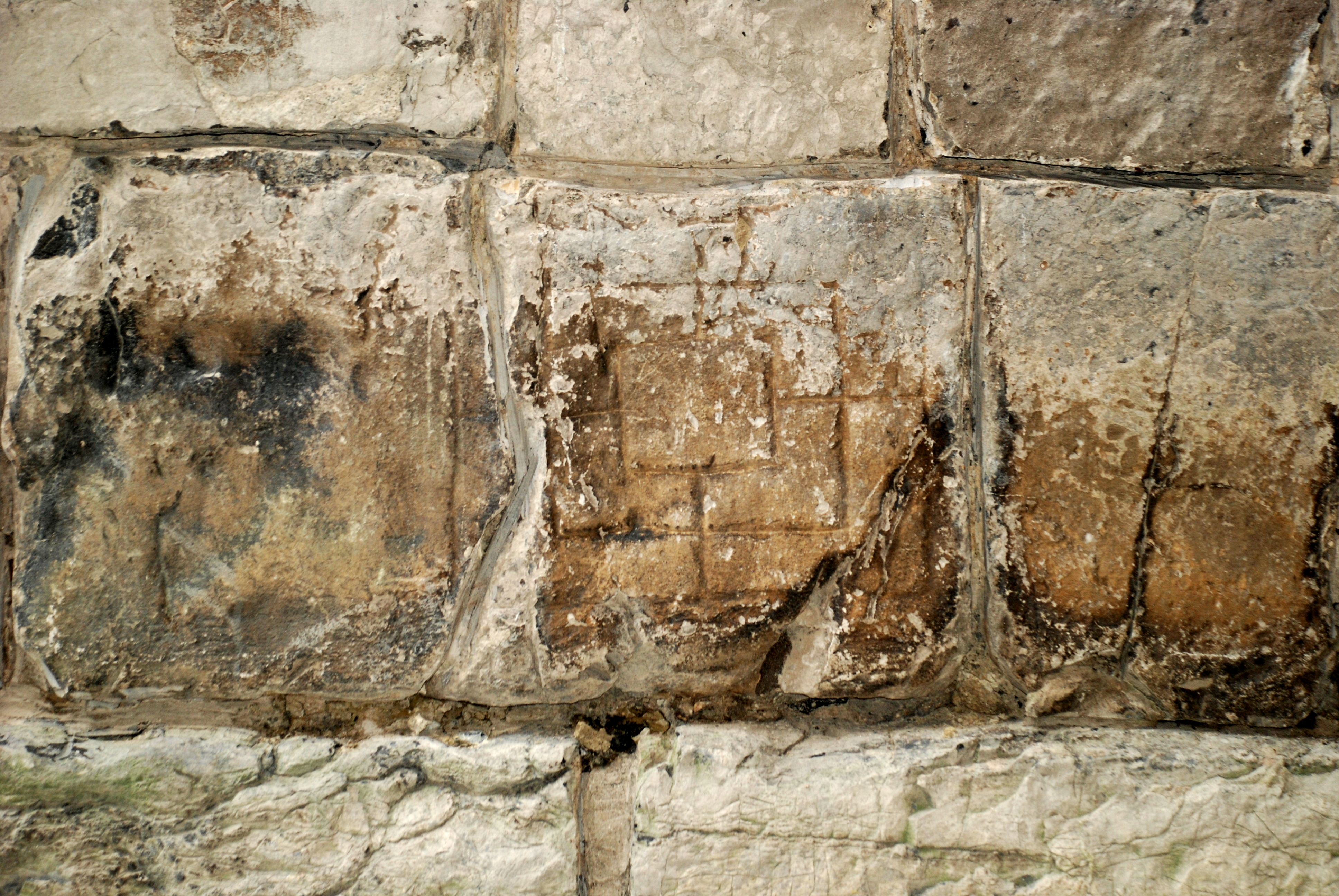 Belgique - Province de Namur - Église Saint-Maurice de Sclayn - Pierre gravée de la base de la tour occidentale